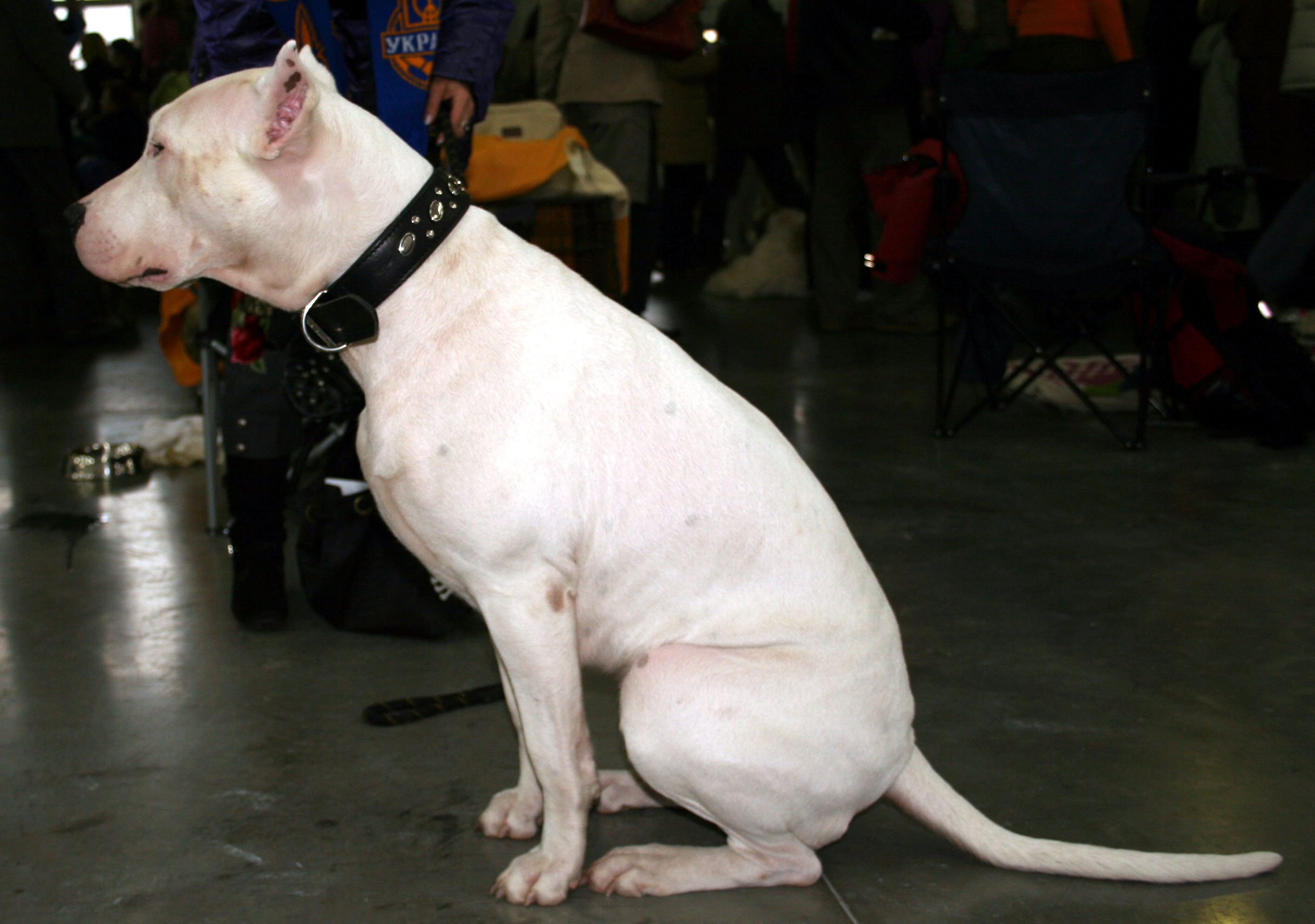 Dog_argentyński na Światowej Wystawie Psów Rasowych w Poznaniu